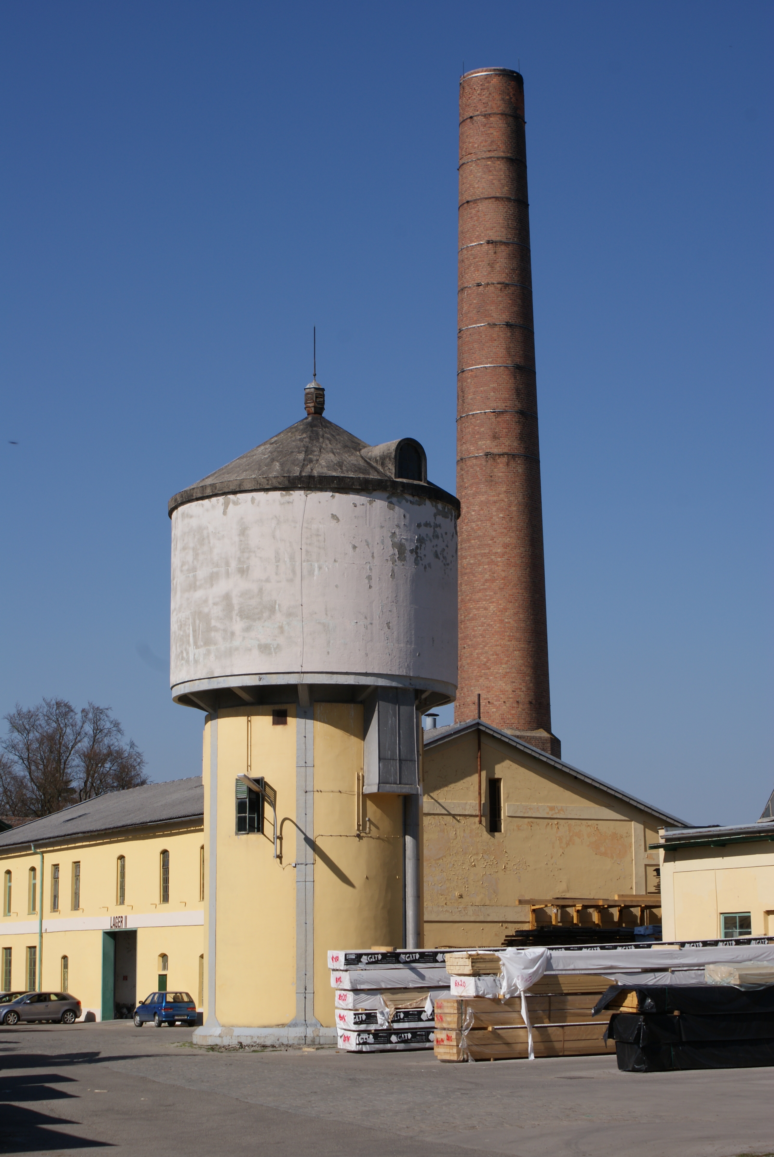 Das Werksgelände der ehemaligen Harlander Coats